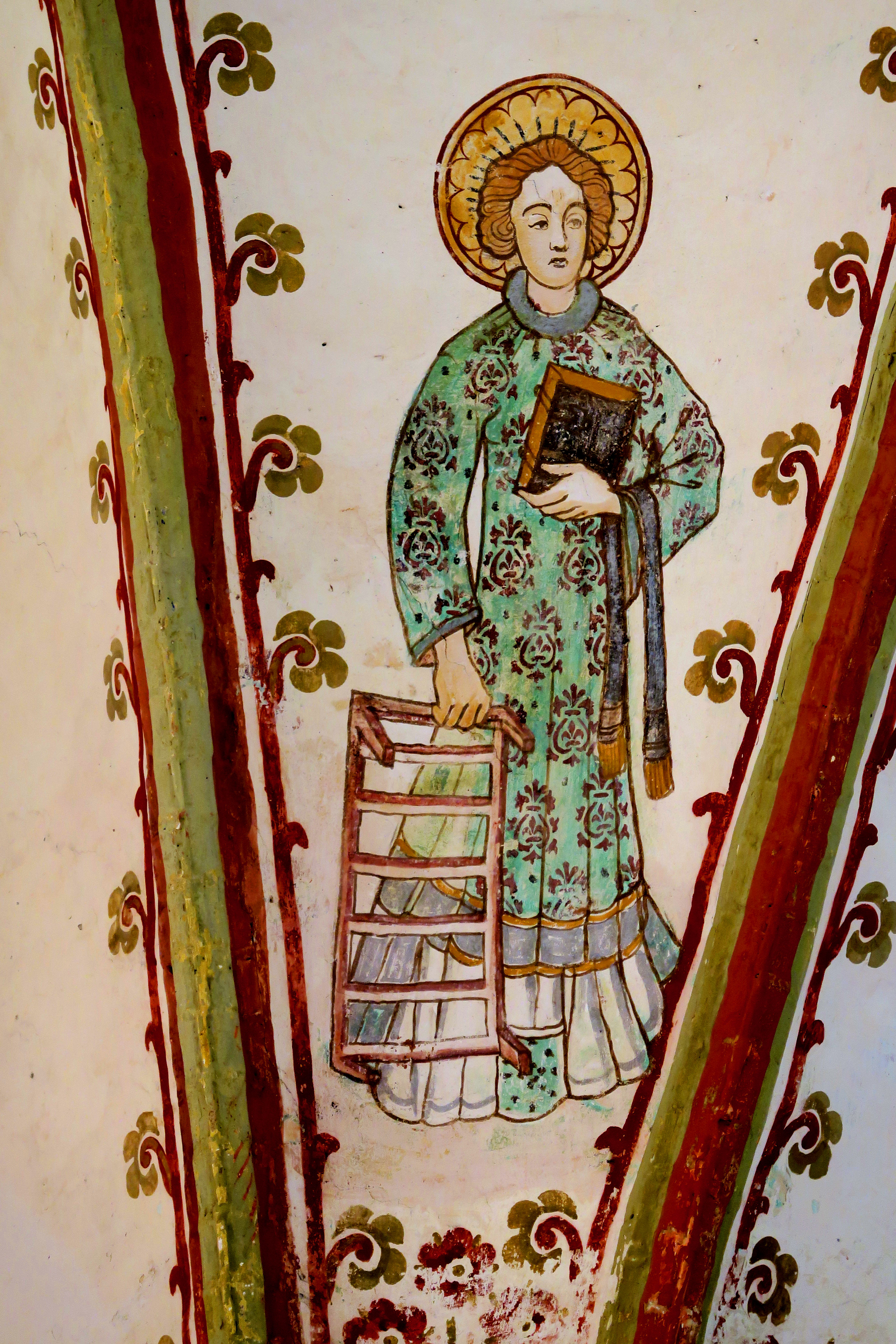 Wandmalerei bildet den Hl. Laurentius, den Patron der Dorfkirche in Hornstorf ab